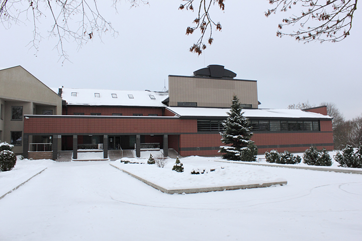 Kernavės archeologijos ir istorijos muziejus